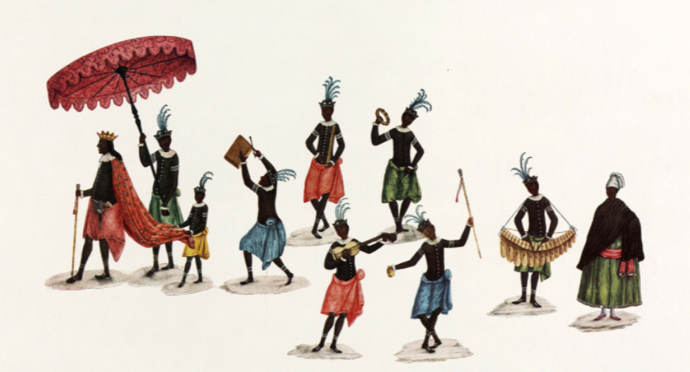 Rei negro, sob o costumeiro guarda-sol, participa da solenidade de sua coroação. Note-se os instrumentos musicais: uns de matriz européia, como a viola, e outros de matriz africana, como o atabaque e a marimba.